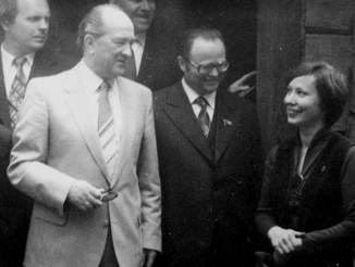 Беларуская (тарашкевіца): Унучатая пляменьніца Янкі Купалы Жанна Дапкюнас на ўрачыстасьцях у Вязынцы з нагоды 90-годзьдзя беларускага Песьняра разам з тагачасным старшынём Савету Міністраў БССР Ціханам Кісялёвым (зьлева на першым плане) і тагачасным другім сакратаром ЦК КПБ Аляксандрам Аксёнавым (у цэнтры), Вязынка